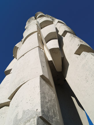 Spomenik Podhumskim žrtvama u Sobolima na Grobničkom polju. Autor obeliska je akad. kipar Šime Vulas. Spomenik je uređen 1970. godine.